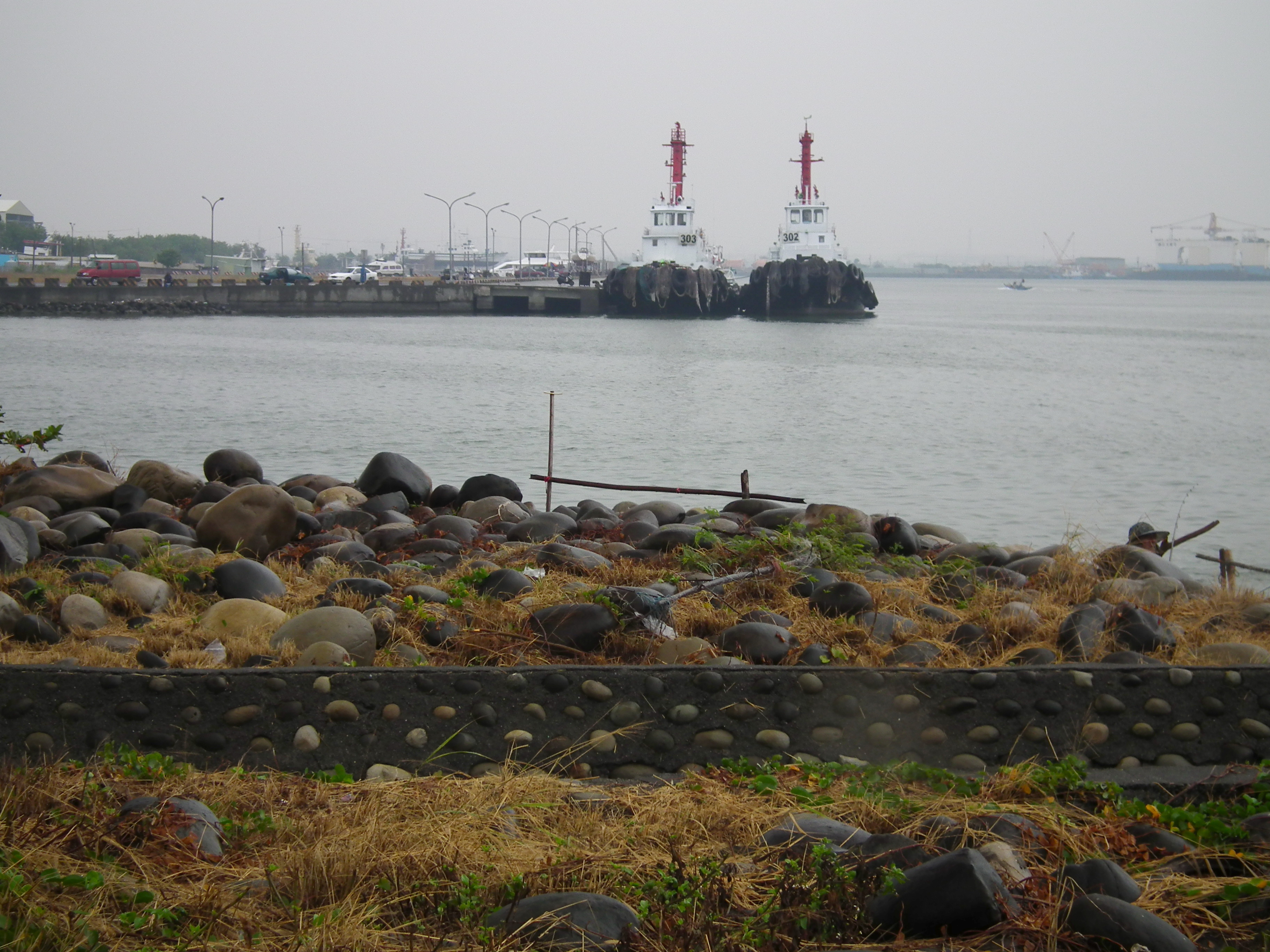 Xingda Harbor 興達港